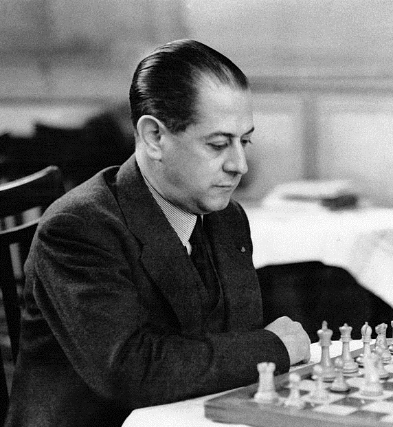 L'ex-champion du monde des échecs Jose Raul Capablanca, joueur cubain, lors du Tournoi d'échecs du Kent contre Fairhurst, circa 1930 à Margate, Royaume-Uni.